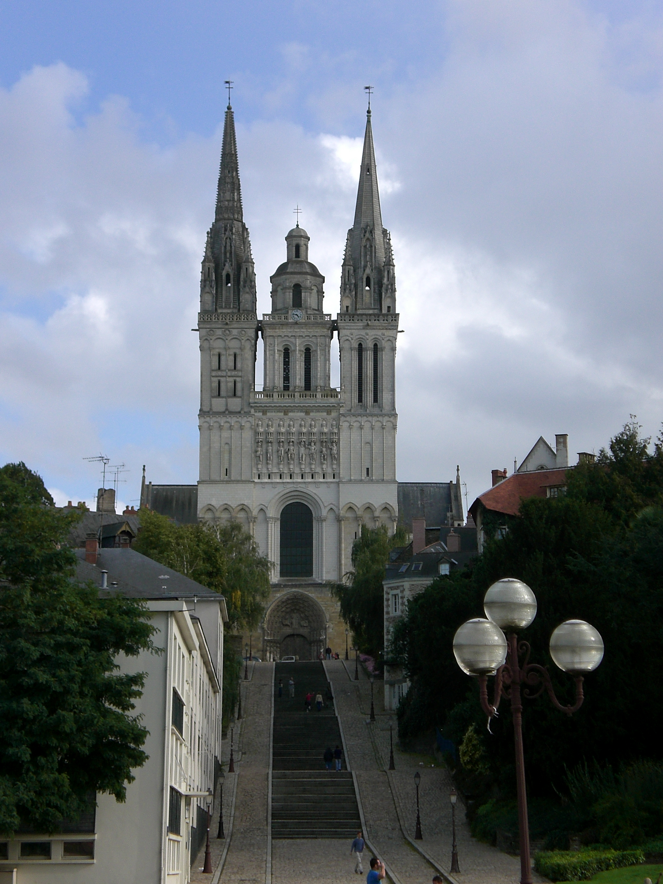 Vue globale de la Cathédrale Saint-Maurice d'Angers.